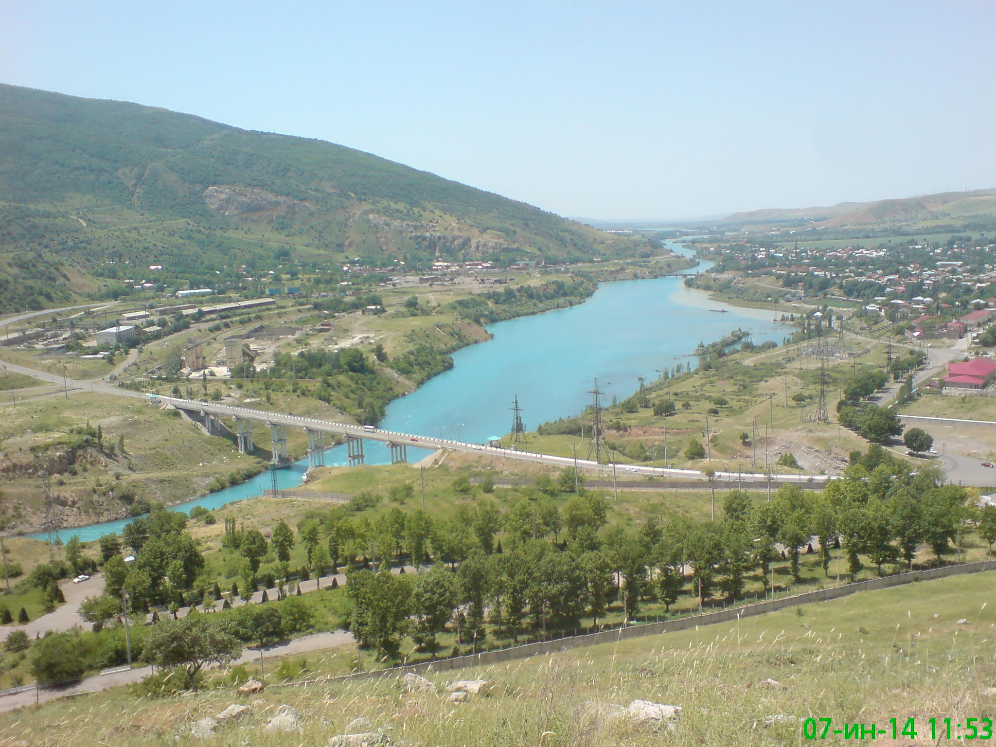 Река Чирчик за Чарвакской плотиной. Видны посёлки Ходжикент (слева) и Чарвак (справа)